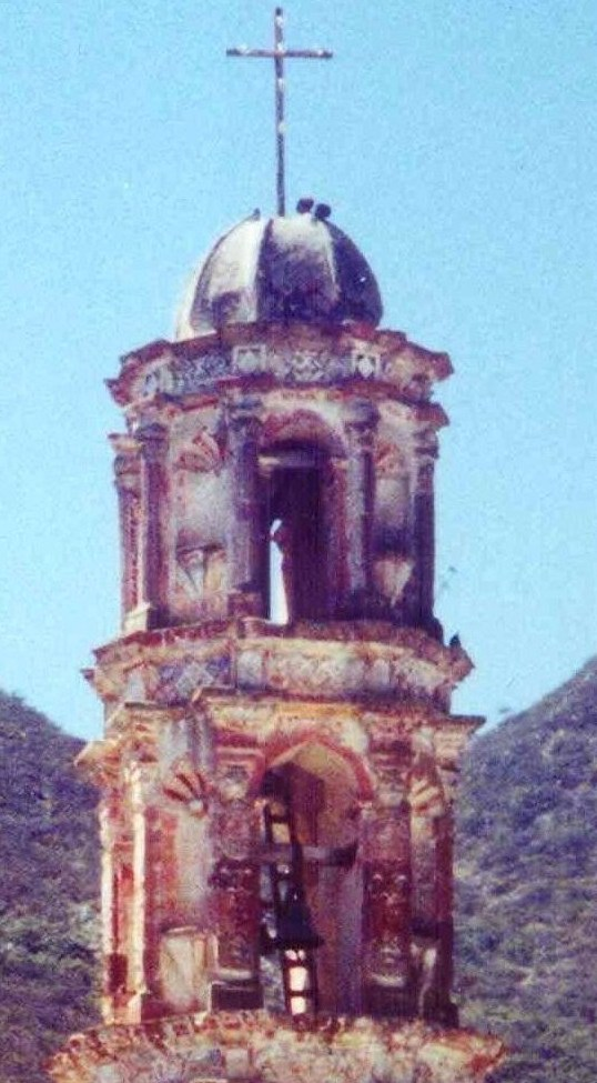 Templo de la Cruz de Santa Teresa en Cardonal - copia